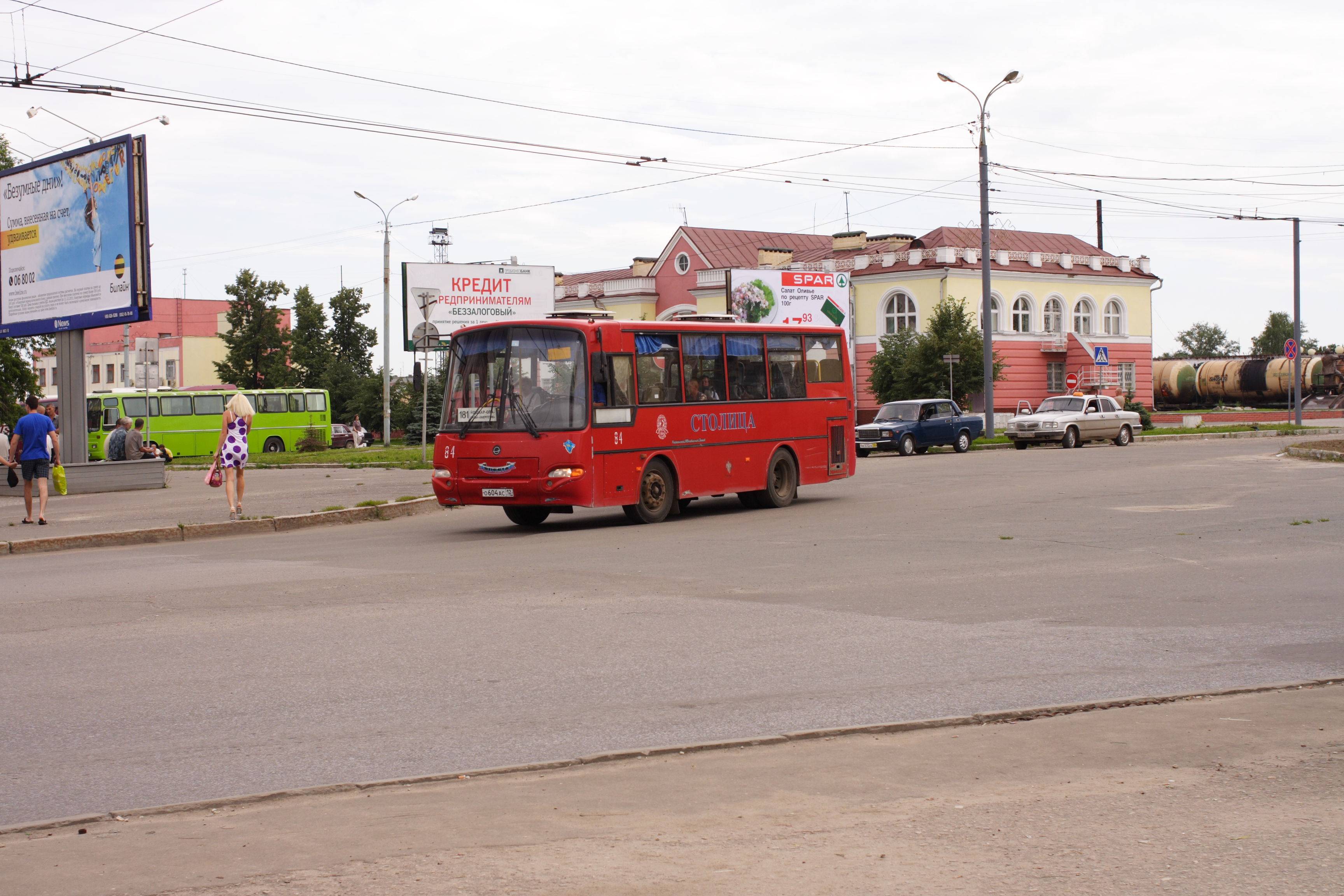 Красный автобус в Йошкар-Оле